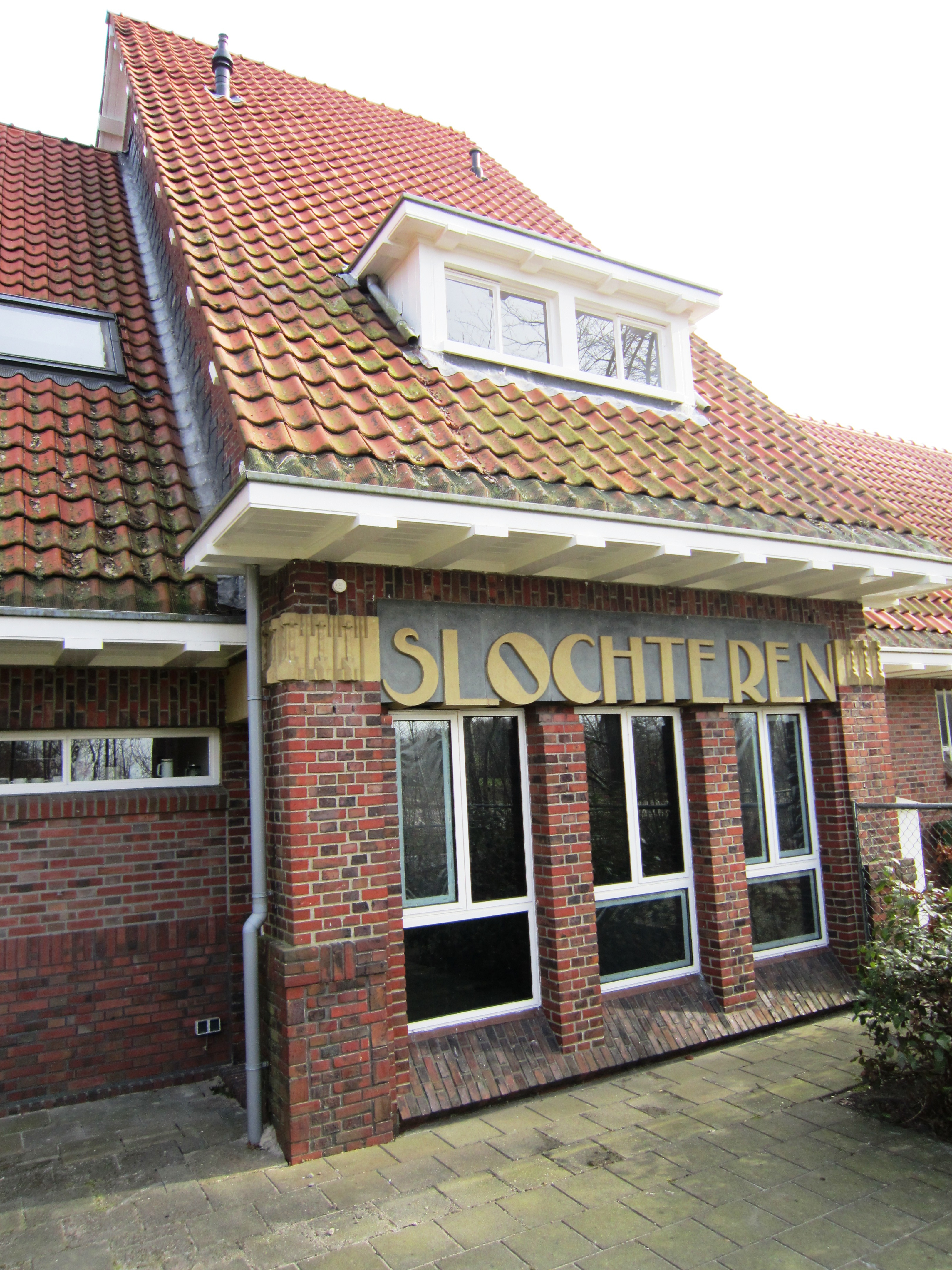 Slochteren IPA 1